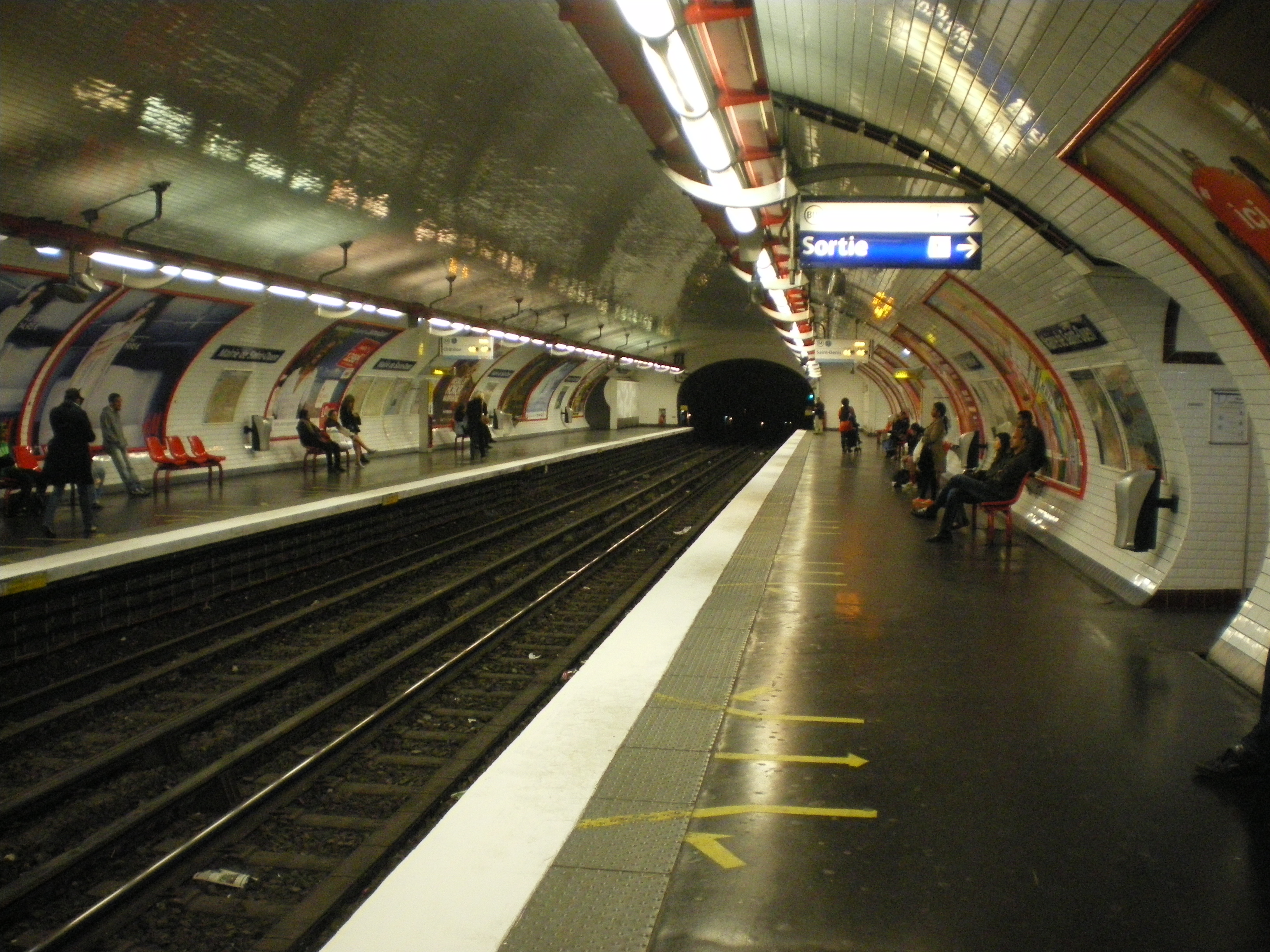 Station mairie de Saint-Ouen